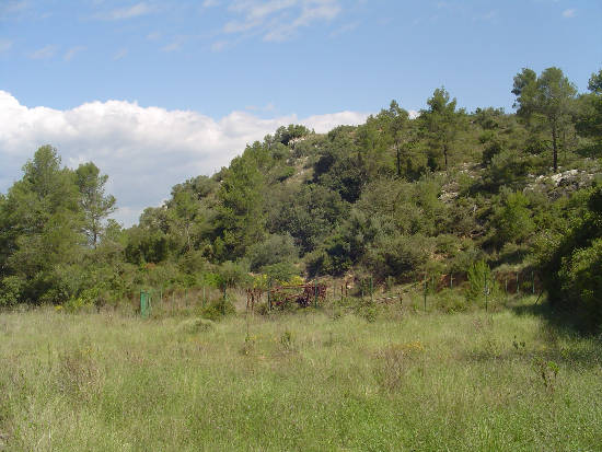 Yacimiento de Els Casots, Subirats (Barcelona, España)